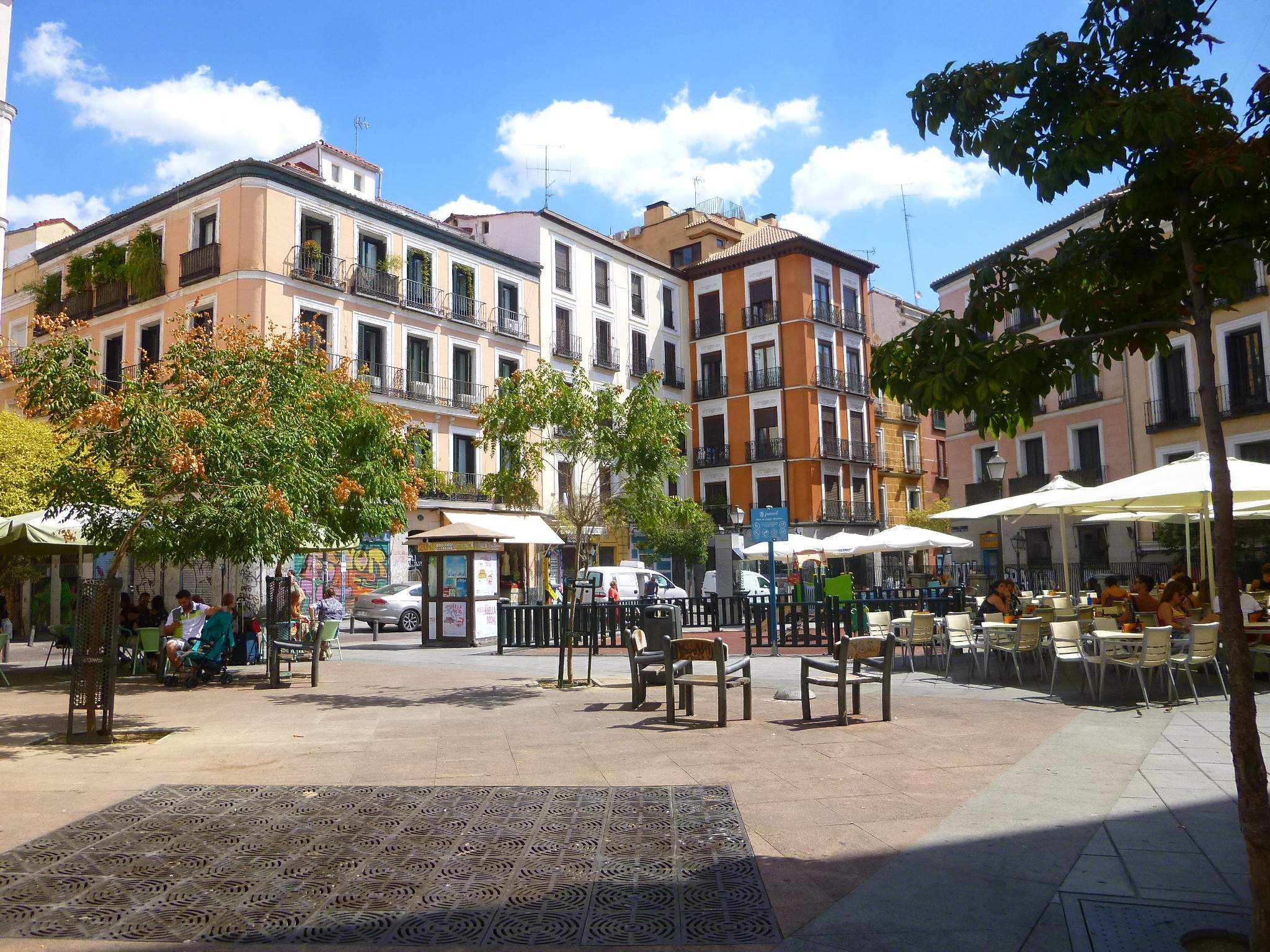 Madrid - Malasaña, Plaza Juan Pujol